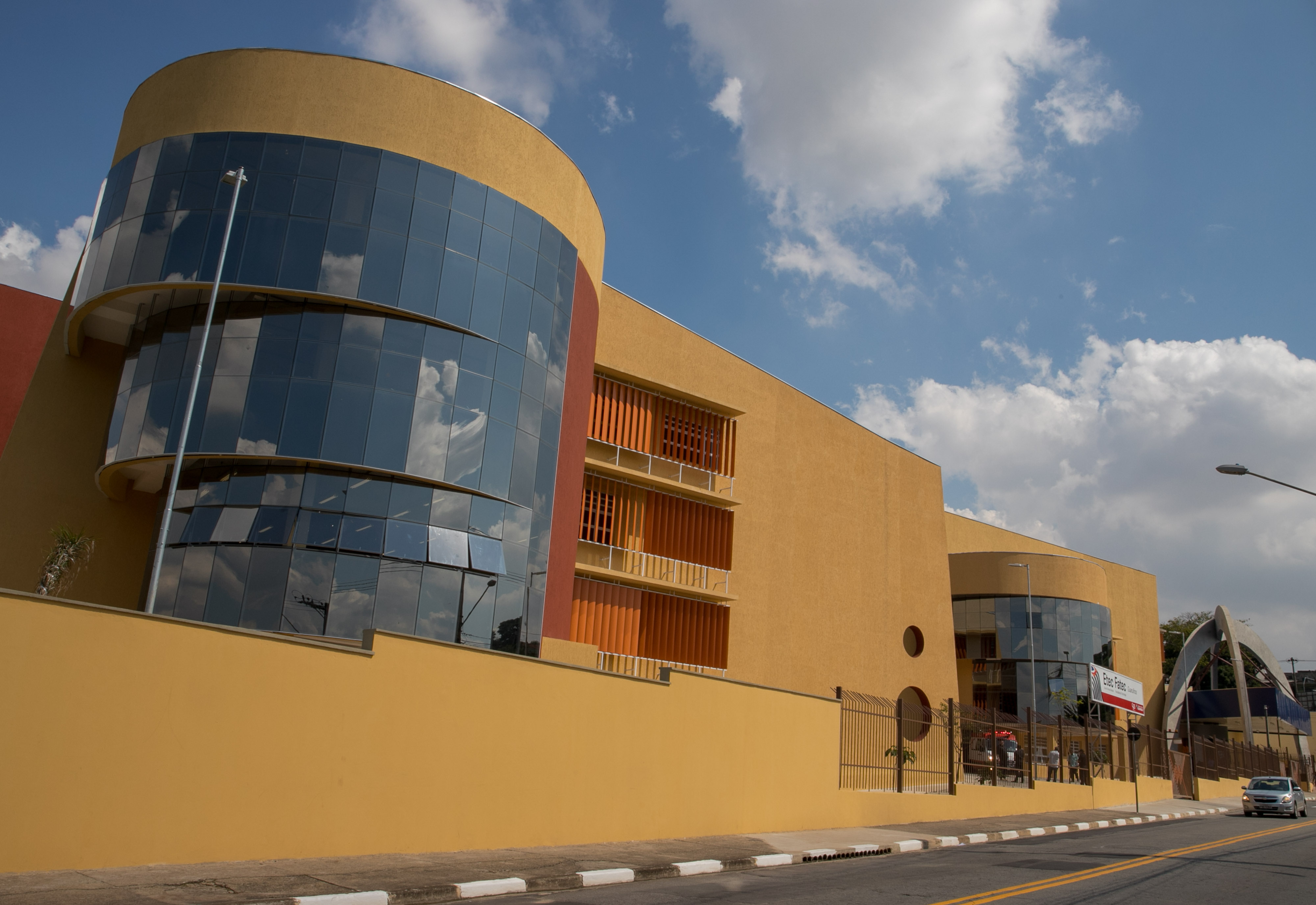 O governador do Estado de São Paulo, Geraldo Alckmin, durante inauguração da Nova Sede da FATEC de Guarulhos. Local: Guarulhos/ SP Data: 04/04/2018 Foto: Governo do Estado de São Paulo